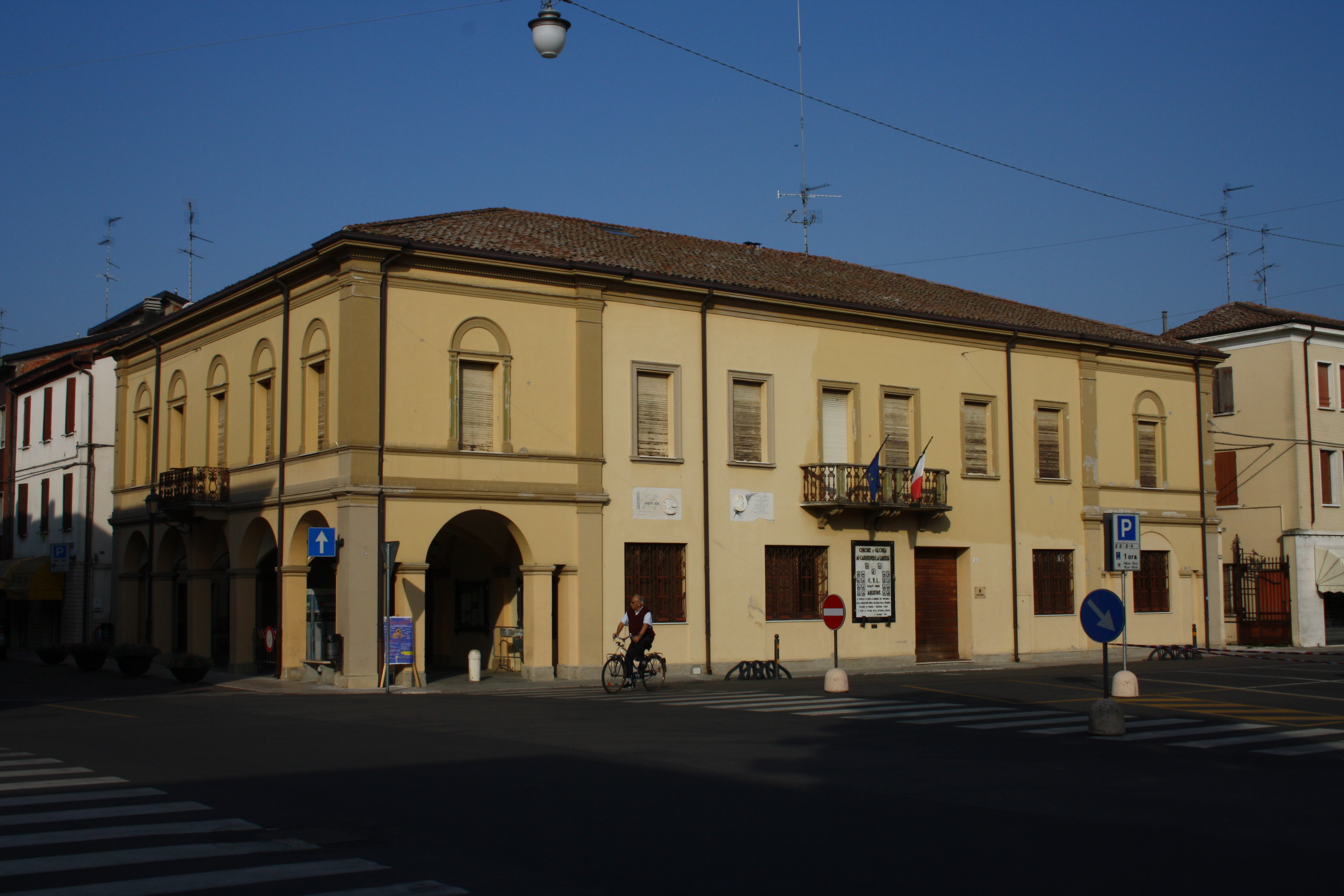 Palazzo comunale - com'era This is a photo of a monument which is part of cultural heritage of Italy.